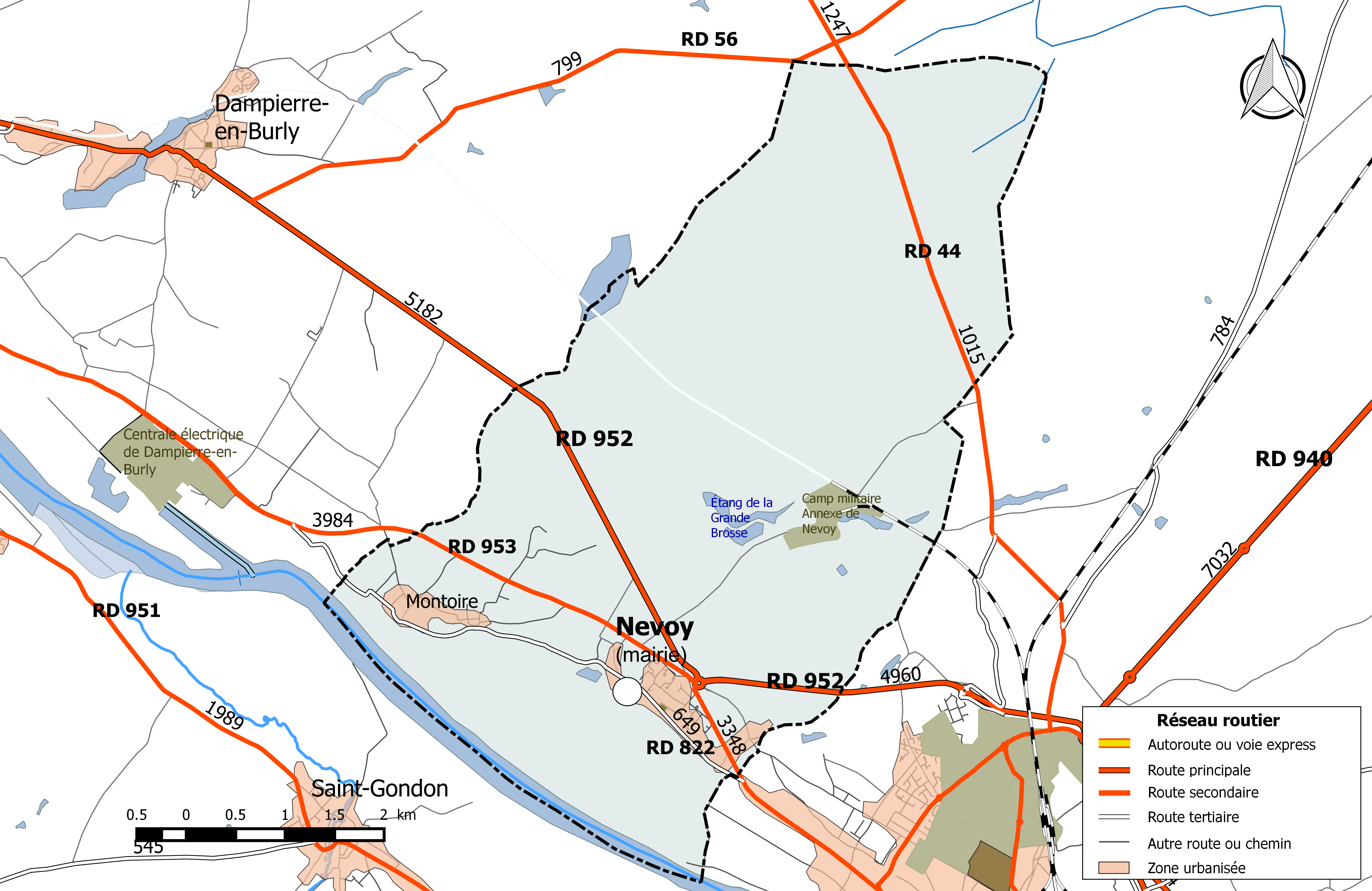 Carte du réseau routier de la commune de Nevoy.